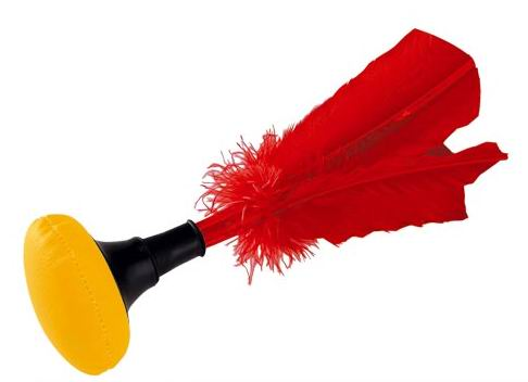 Indiaca "Turnier" der Fa. Bremshey